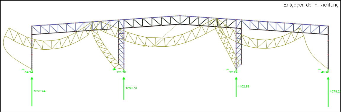 RStab-screenshot